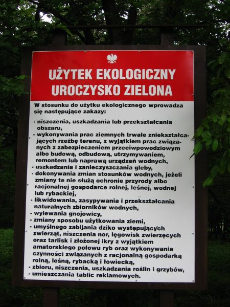 Użytek ekologiczny Zielona w Dąbrowie Górniczej